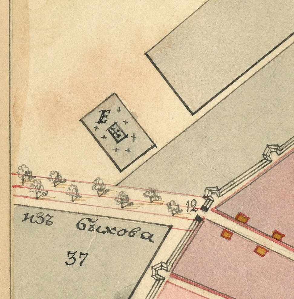 Беларуская (тарашкевіца): Магілёў (Магілёў). Плян места